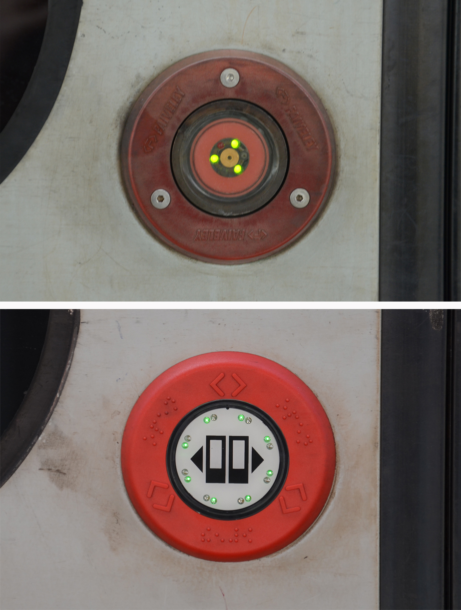 Vergleich: konventionelle Türöffnungstaster (oben) und zur Erprobung eingebaute SENSORtaster (unten)